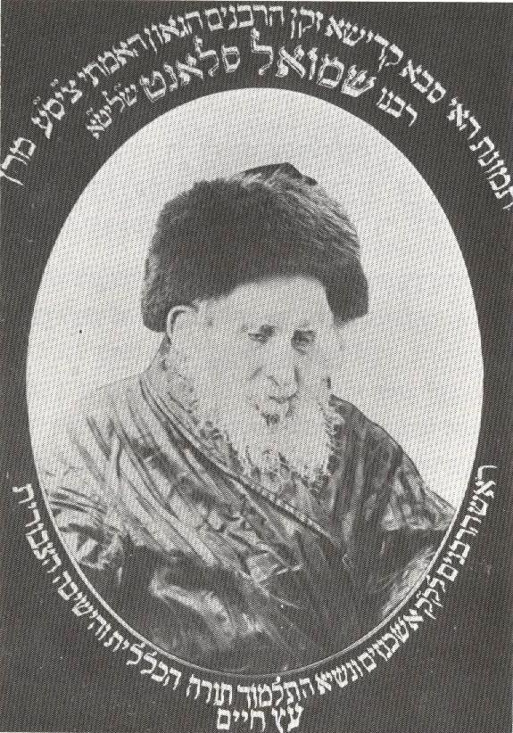 Rabbi Shmuel Salant, 1816-1909.